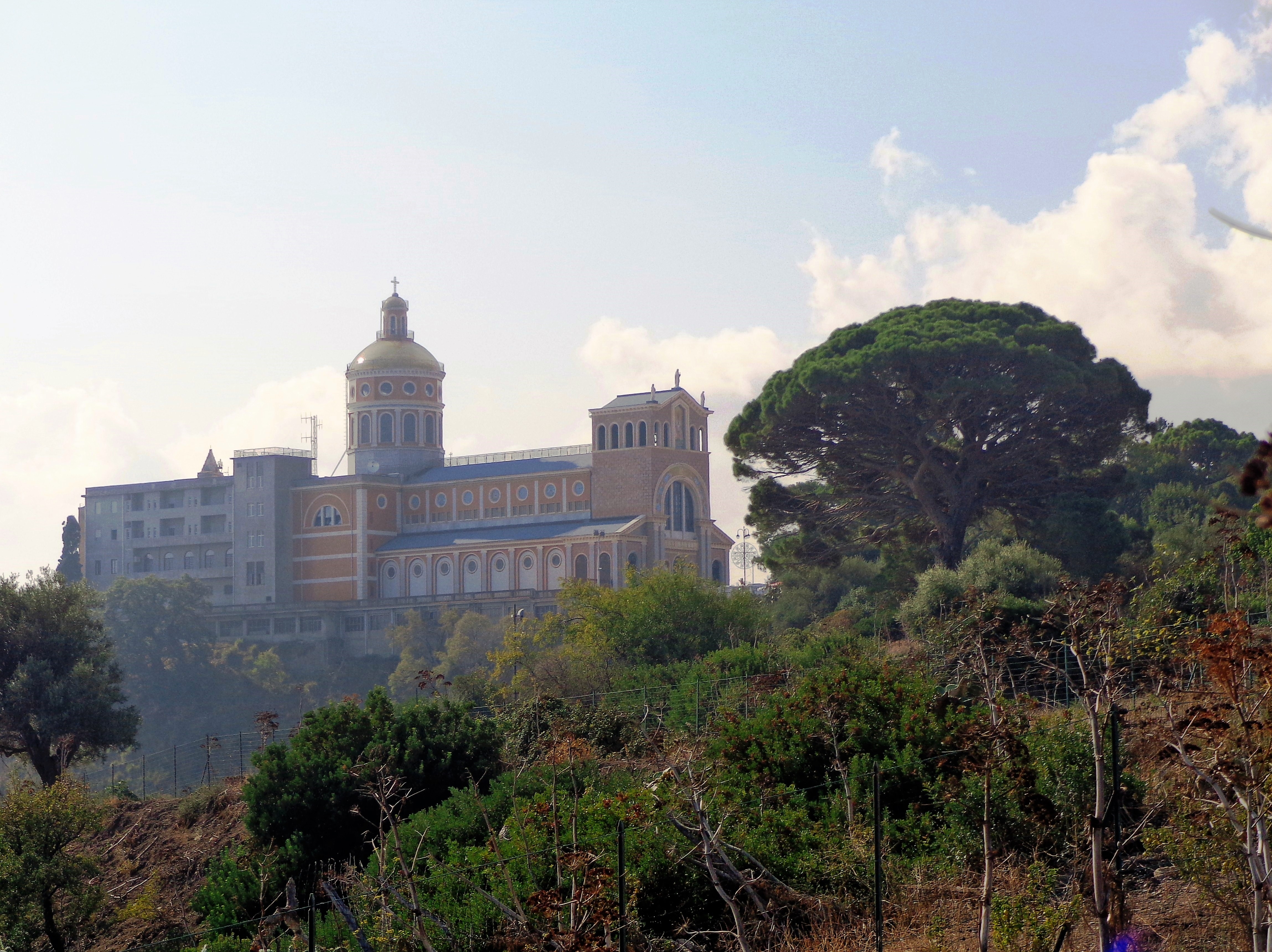 Il santuario visto dalla zona archeologica